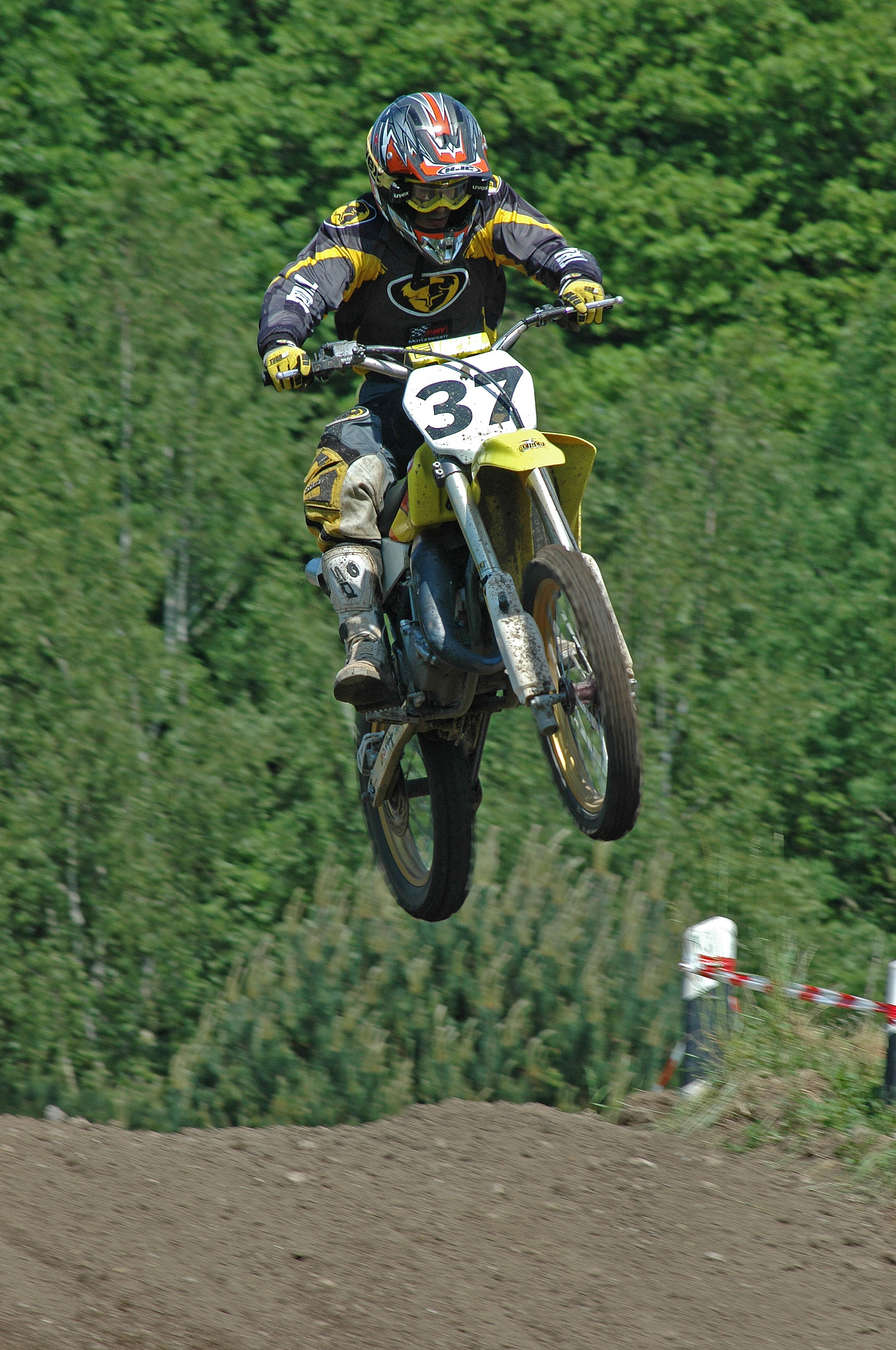 Motocross Moelln